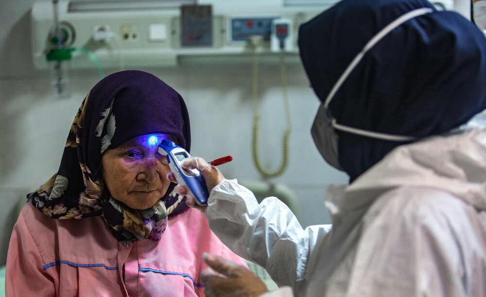 تب سنجی بیمار کرونایی در بیمارستان کامکار قم،